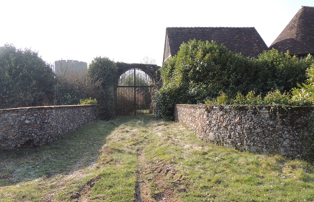 Tour de Bois-Ruffin au second plan à gauche et ruines de la porte à arcade avec herse à l'origine et début des bâtiments de la ferme à droite; murets garde-fous au bord des douves au premier plan avec dans l'accès de l'herbe